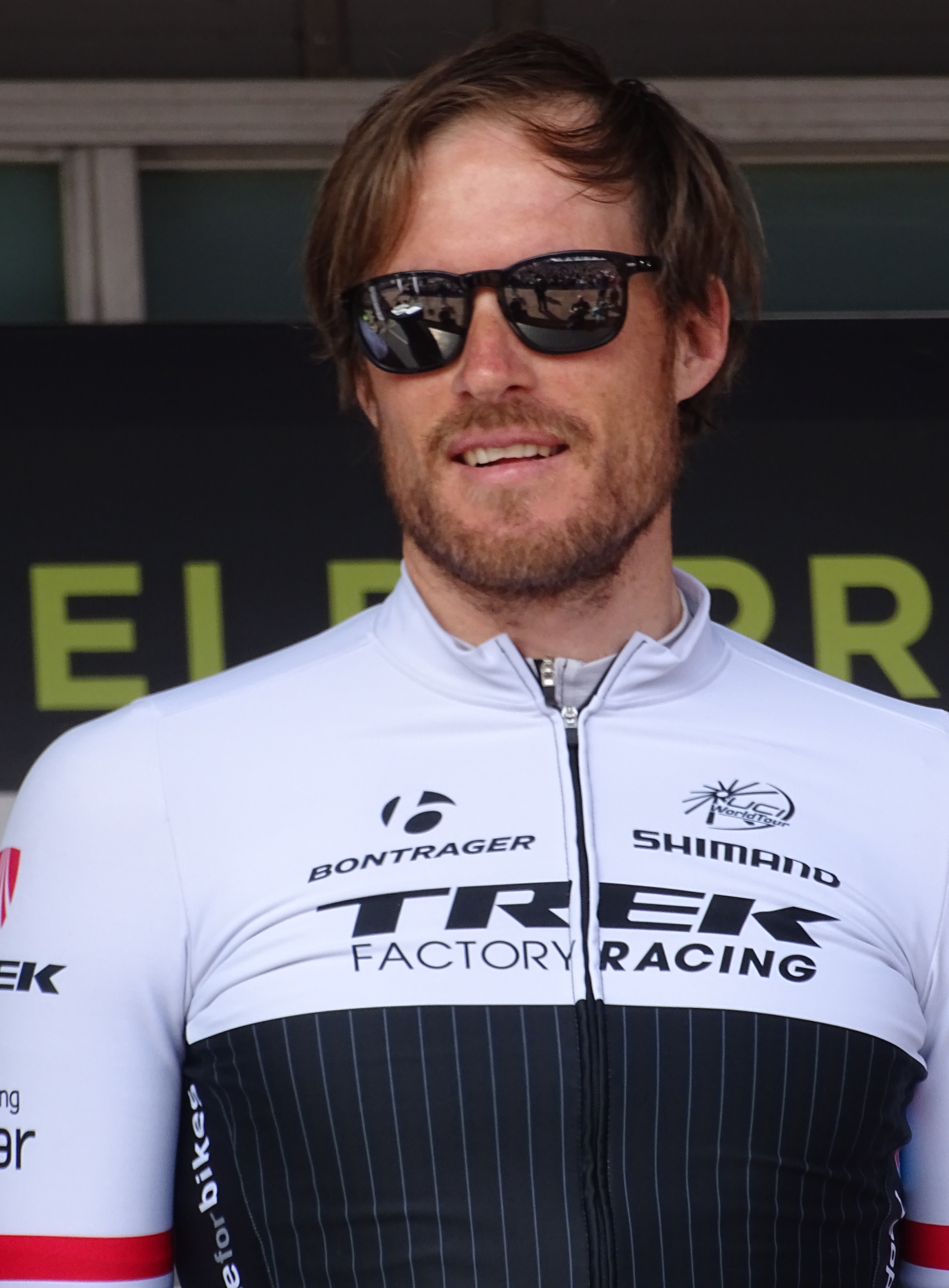 Reportage réalisé le mercredi 8 avril à l'occasion du départ du Grand Prix de l'Escaut 2015 à Anvers, Belgique.